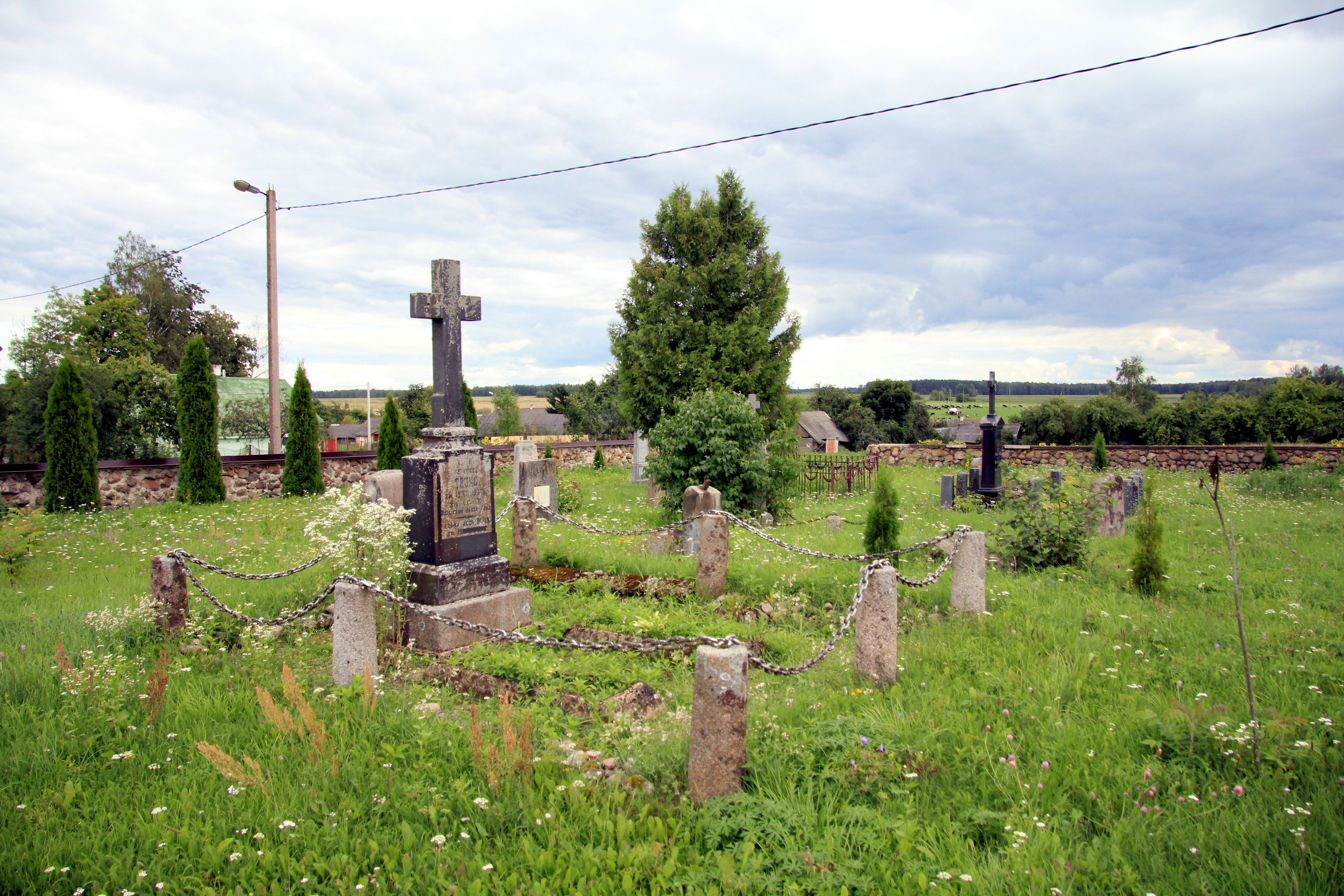 Nacza, rejon werenowski, obwód grodzieński, Białoruś - cmentarz przykościelny.